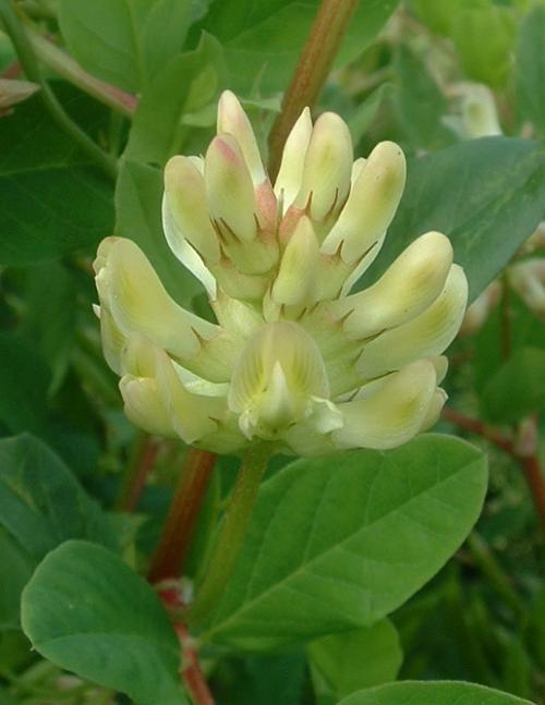 Astragale à feuilles de réglisse, Esprels, juillet 2004